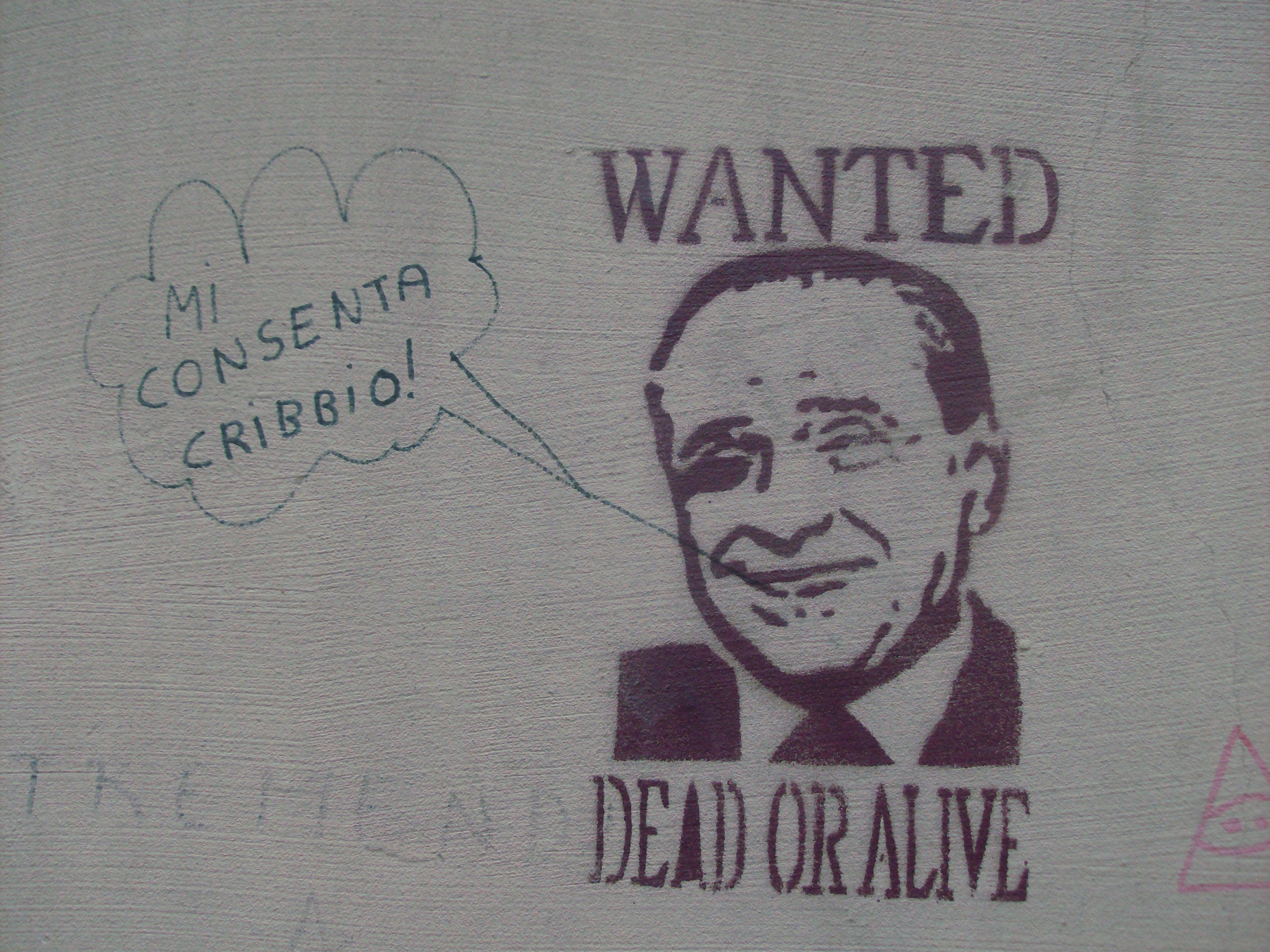 Fumetto di Berlusconi a Torino, con fumetto contenente la frase: "Mi consenta, cribbio!